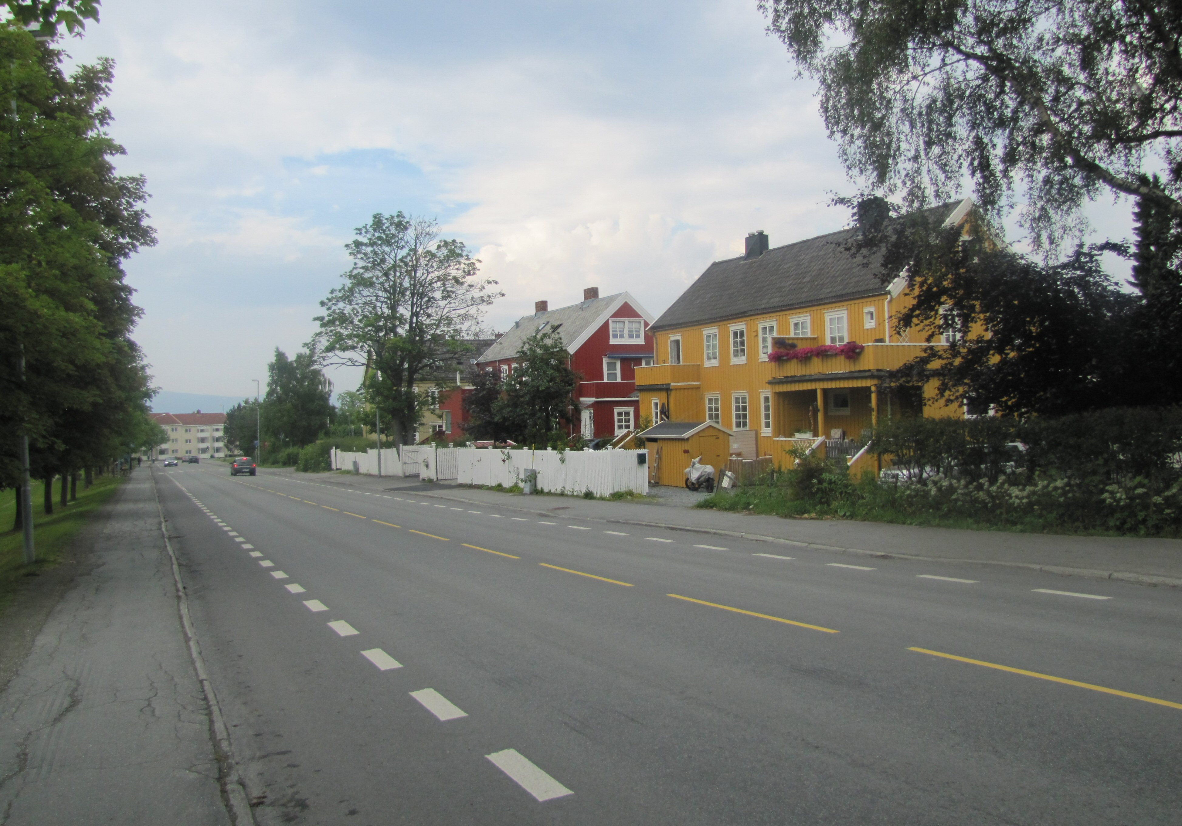 Festningsgata (FV865), Rosenborg, Trondheim